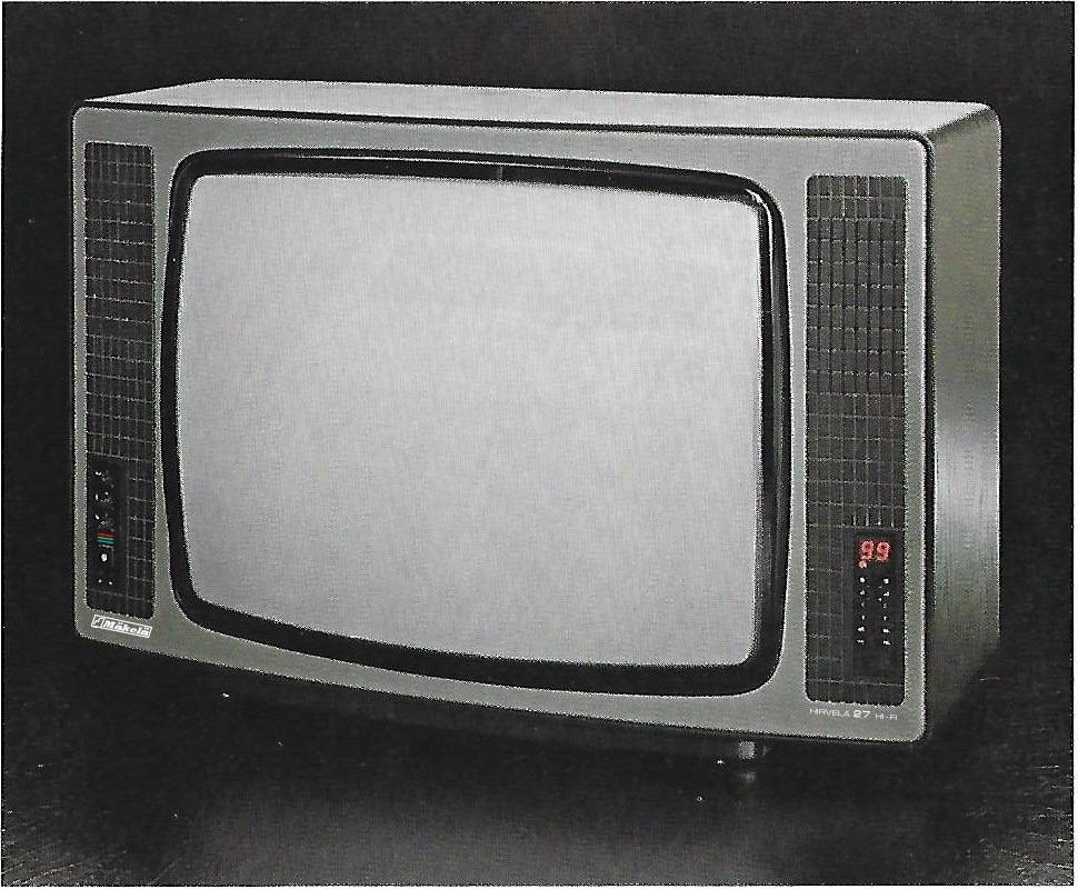 Televisore prodotto dalla Mäkelä di Vigevano (PV) nel biennio 1984-85